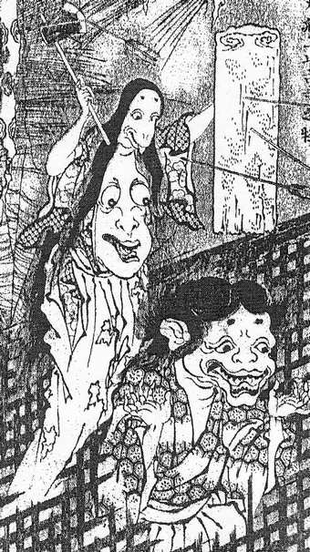 Hakkushuu fune no ue yama furutera no kai (伯州船上山古寺之怪) from the "Ukibotan zenden" (浮牡丹全伝)